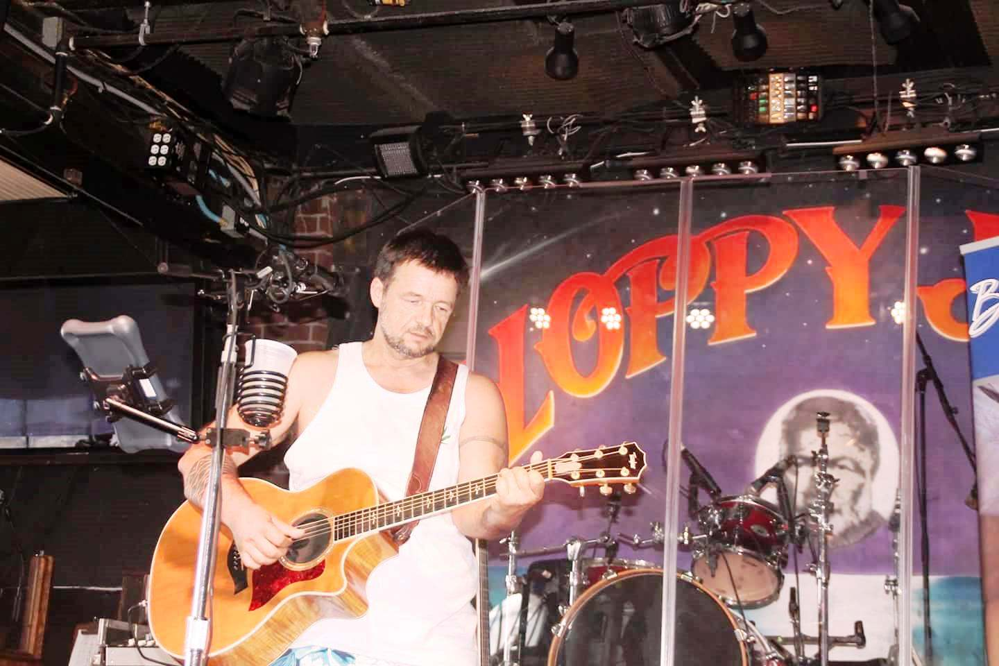 Richi Nagy bei einem Gastauftritt in Sloppy-Joe's, Key West, Florida am 2.9.2015.